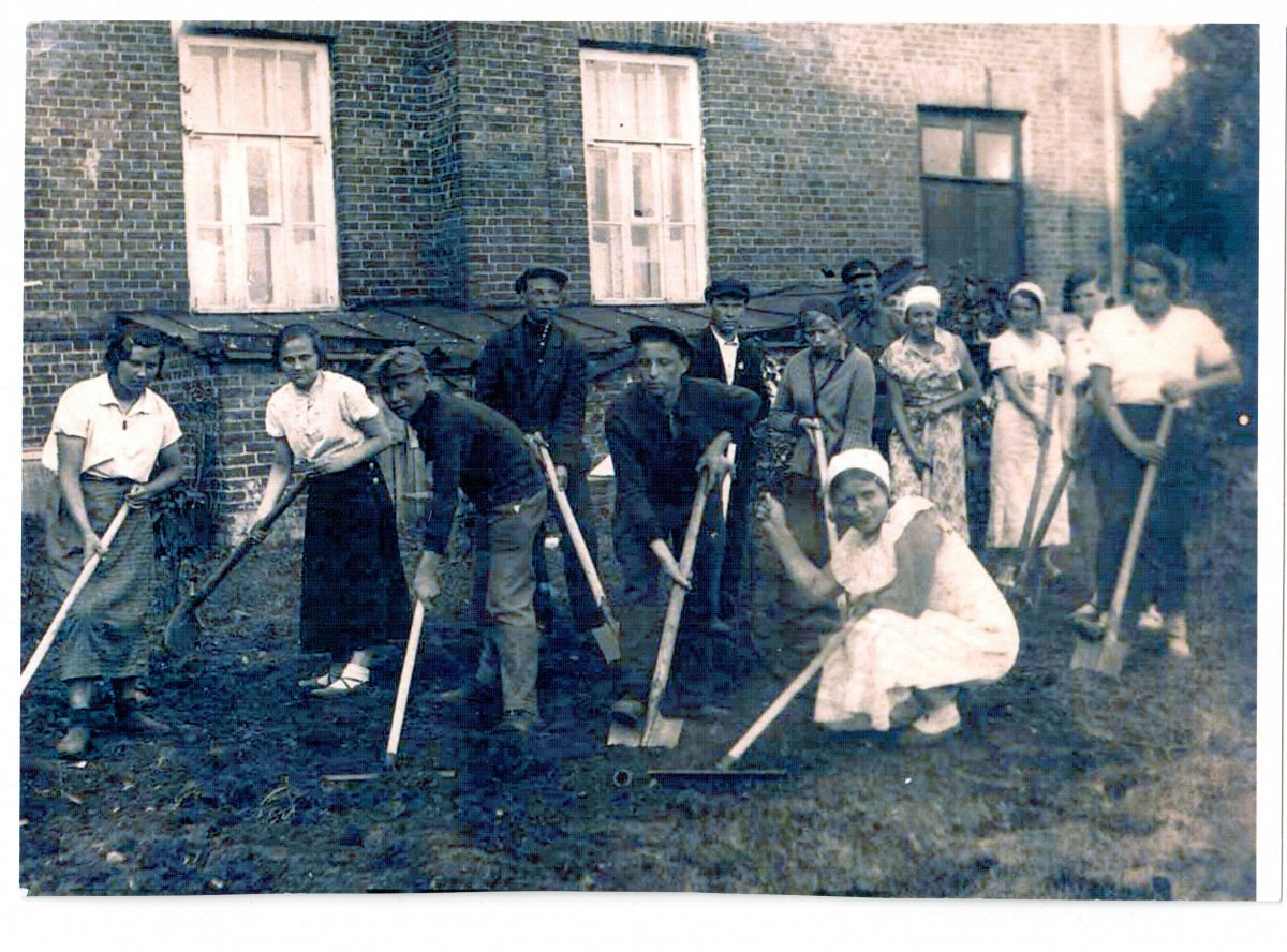 Беларуская (тарашкевіца): Старасельле (Starasielle). Новы касьцёл (?)